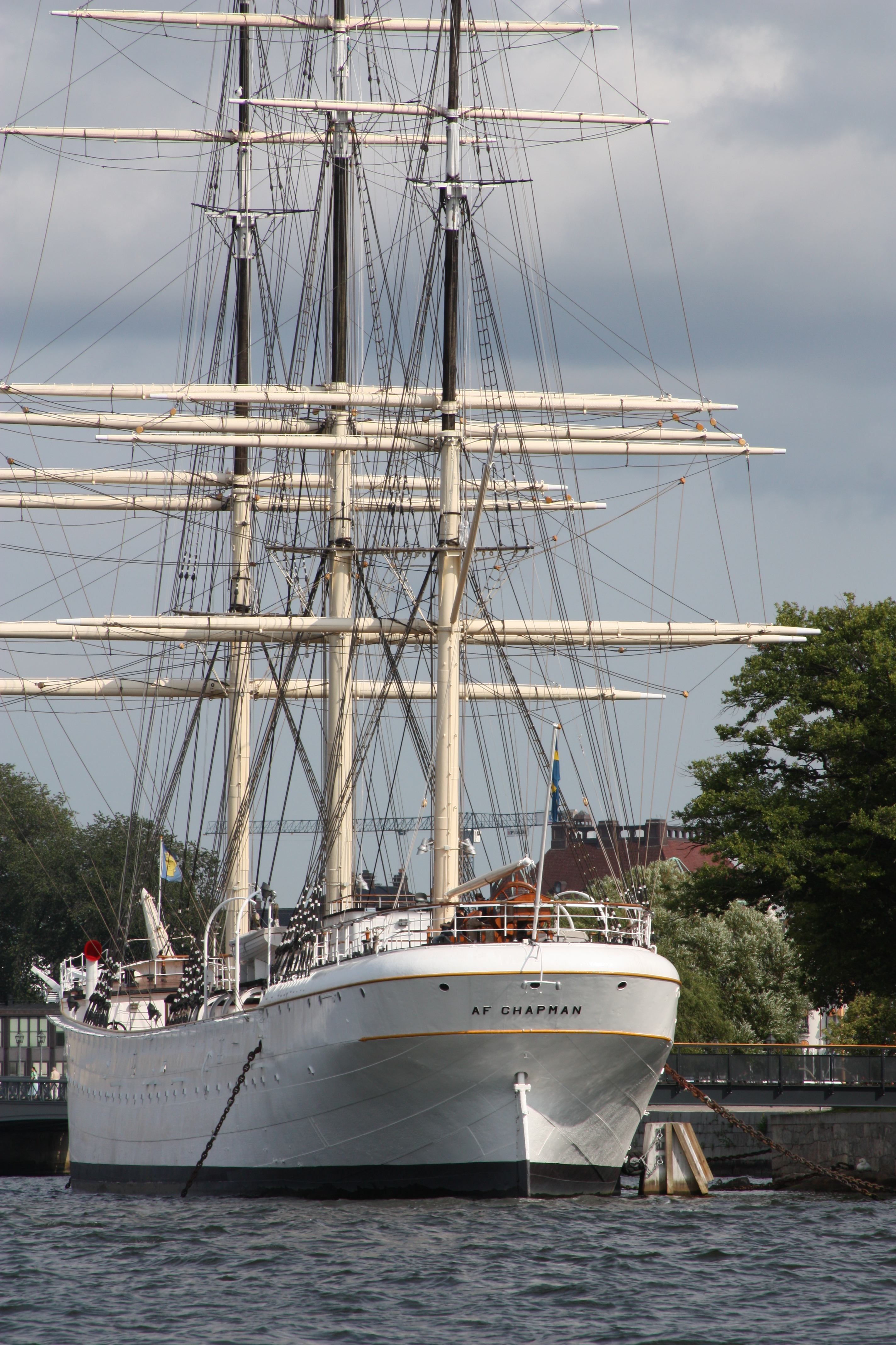 Stockholm